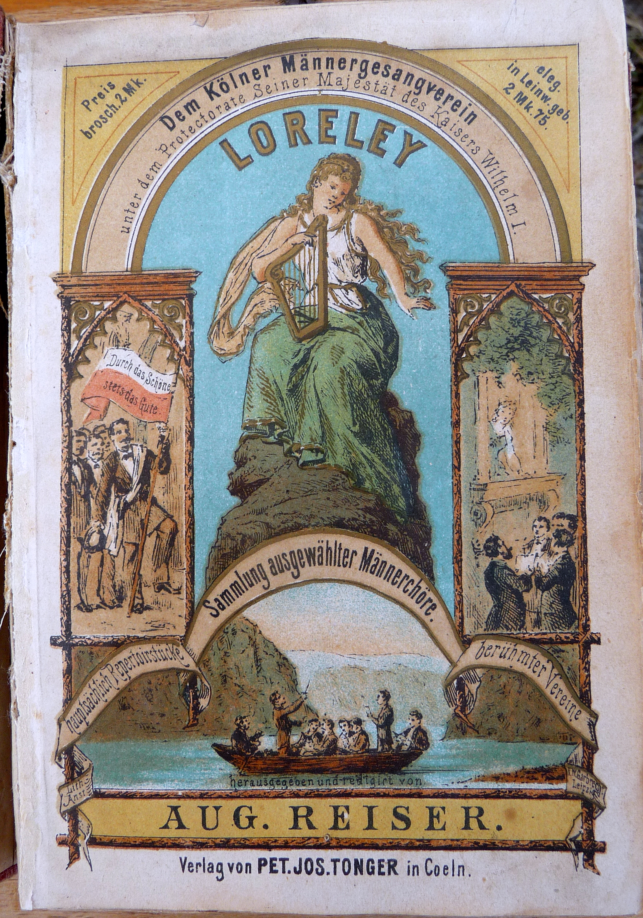 Liederbuch des Kölner Männergesangsvereins. Ed. August Reiser. Coeln: Tonger